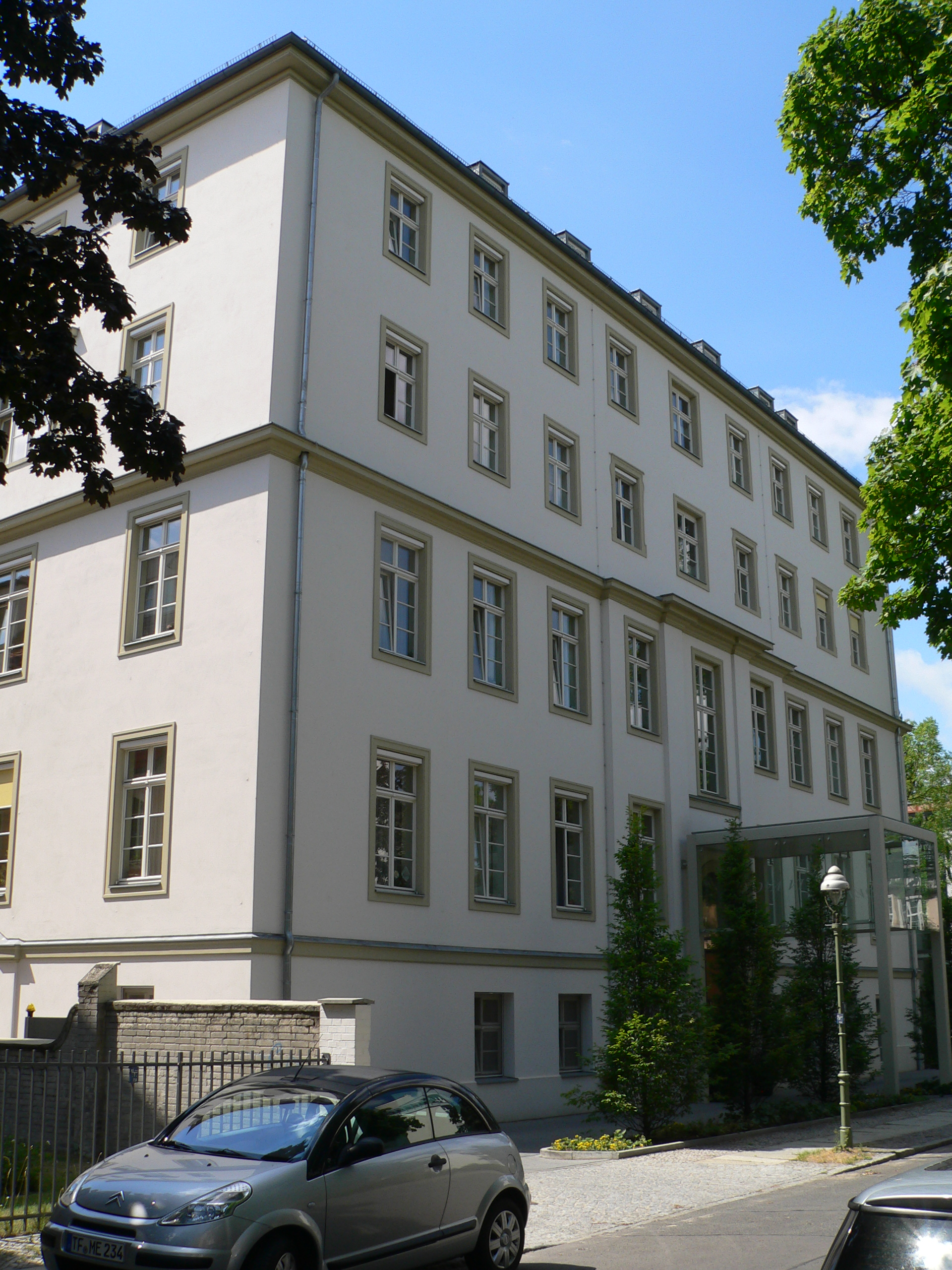 Paulinen Krankenhaus Rüsternallee